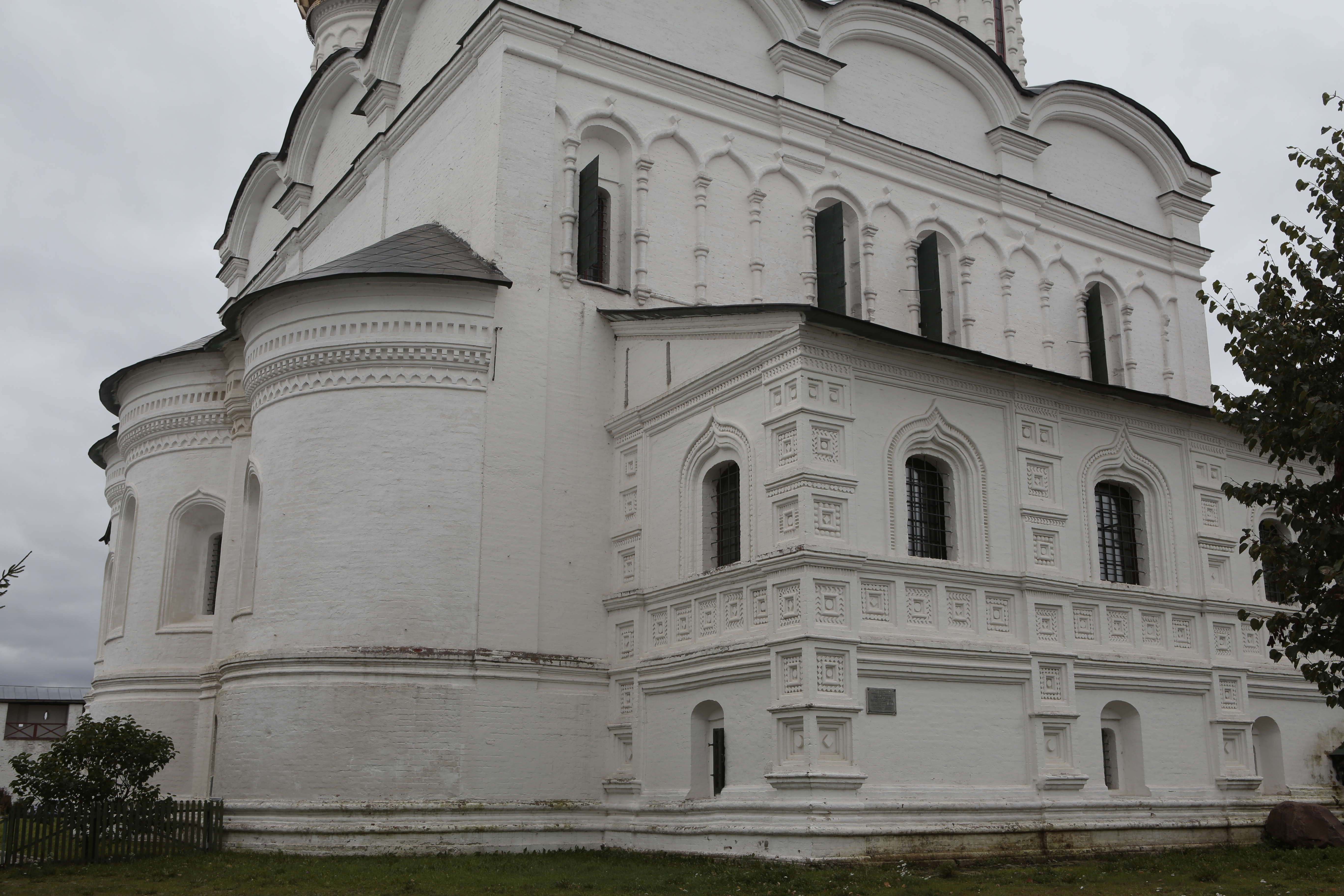 Троицкий собор Ипатьевского монастыря